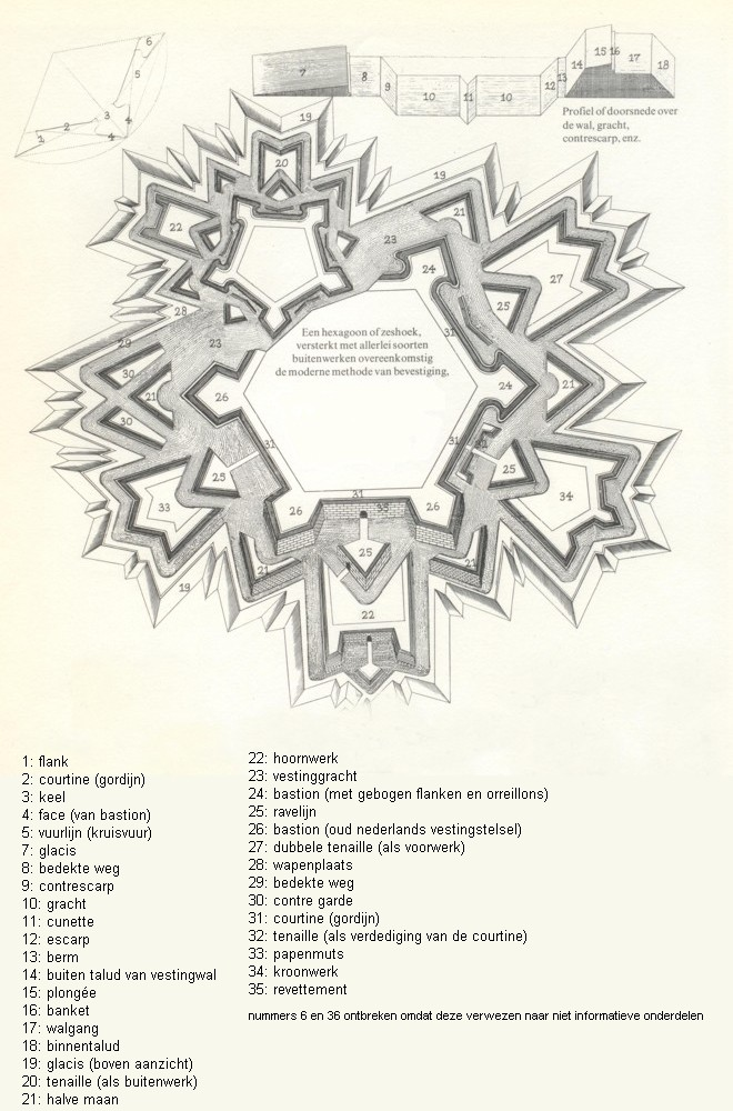 oude prent zonder rechten. door mijzelf aangepast